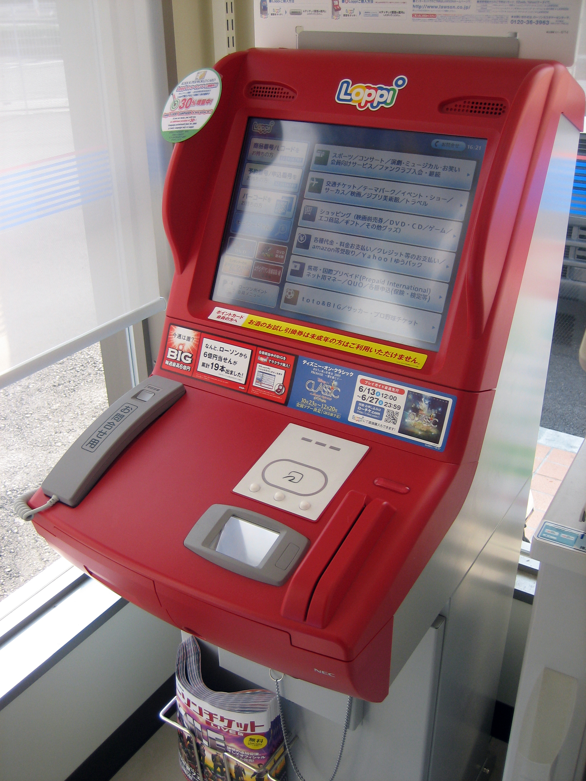 日本のコンビニエンスストアを運営する企業ローソンの店舗に設置されている情報通信端末Loppi (ロッピー）。マルチメディアステーションと呼ばれているものの一つ。